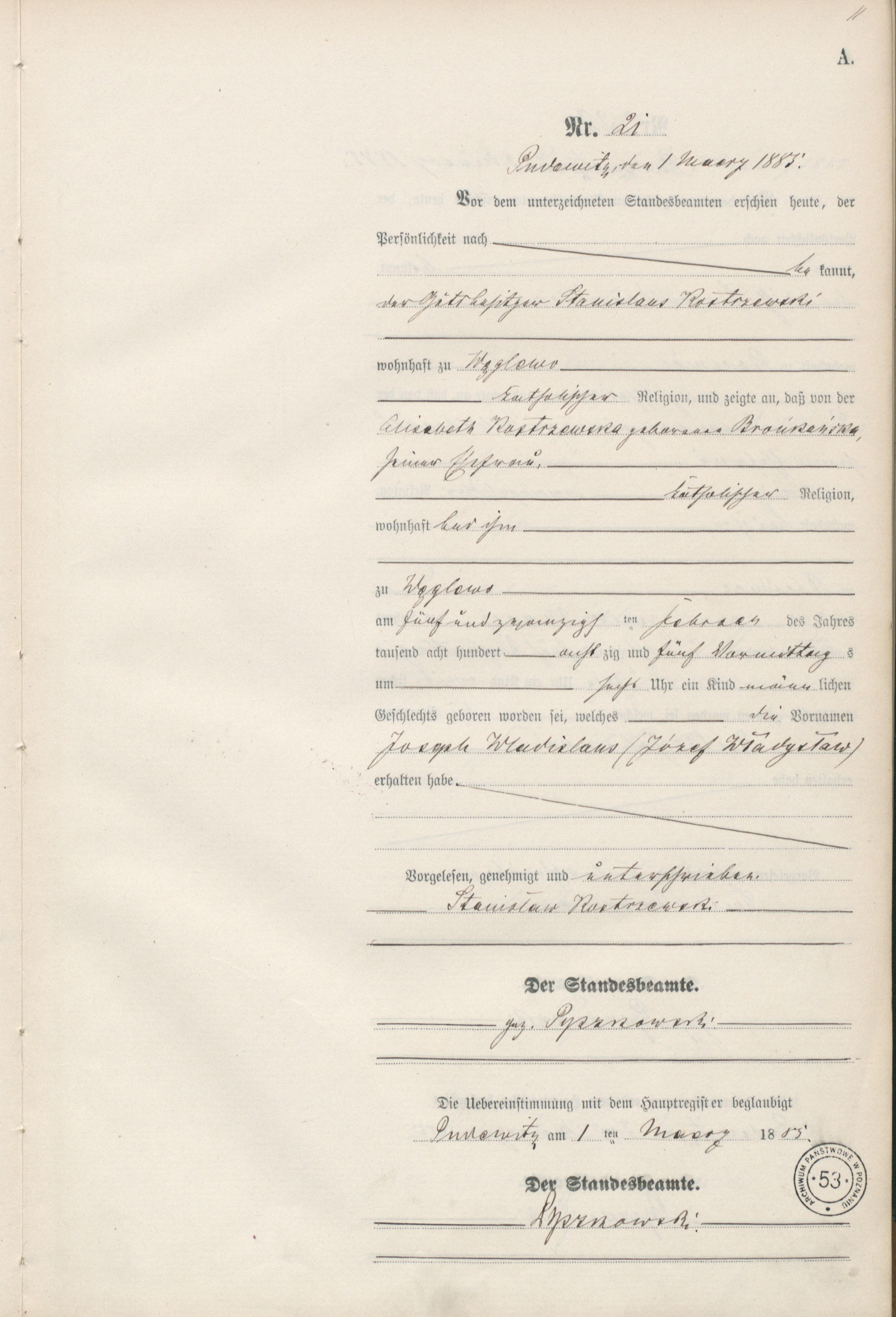 numer 21